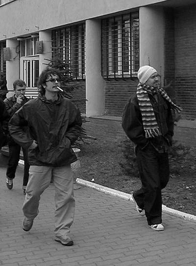 Михалок и Булатников, декабрь 2001